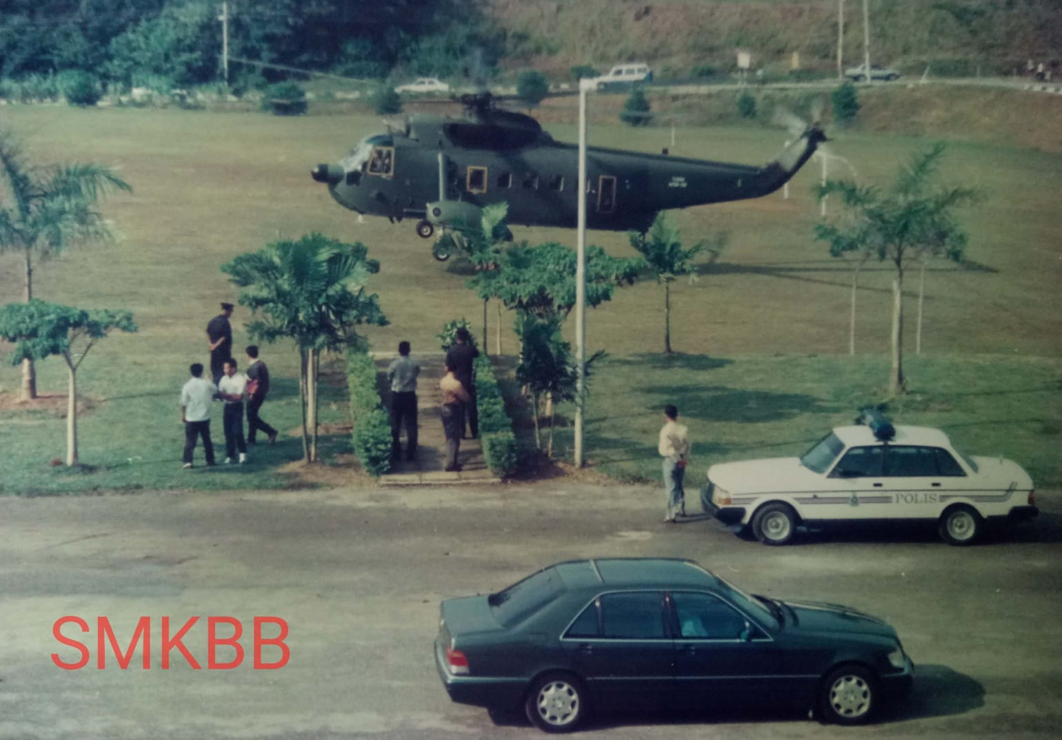 Helikopter